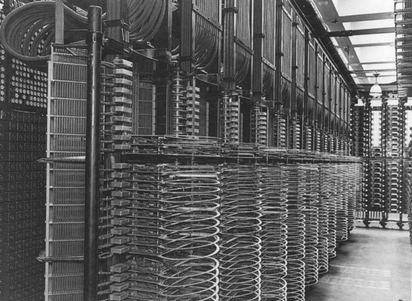 Norra Vasas telefonstation i Stockholm